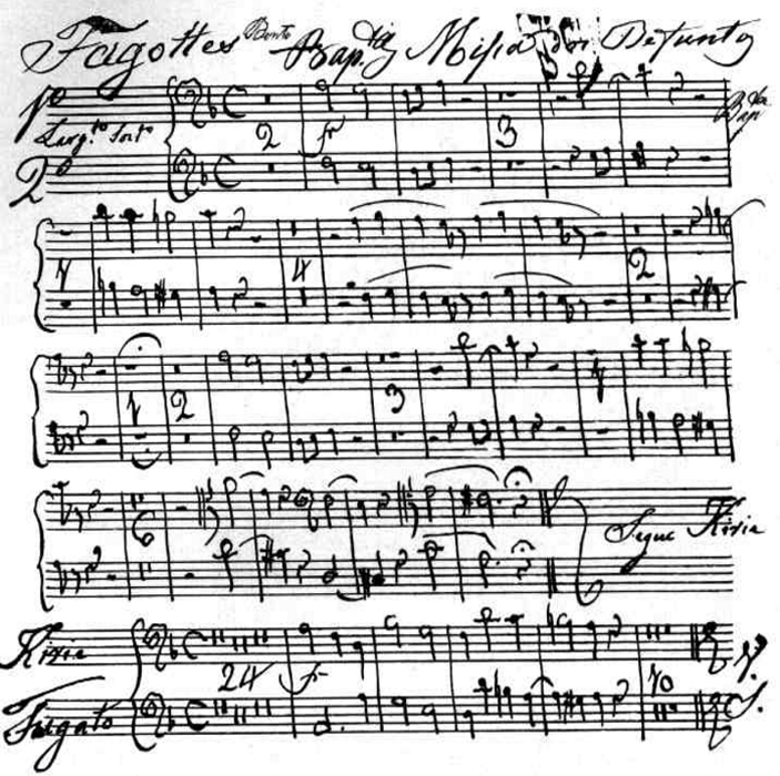 Trecho das partes de fagote da Missa dos Defuntos CPM 185